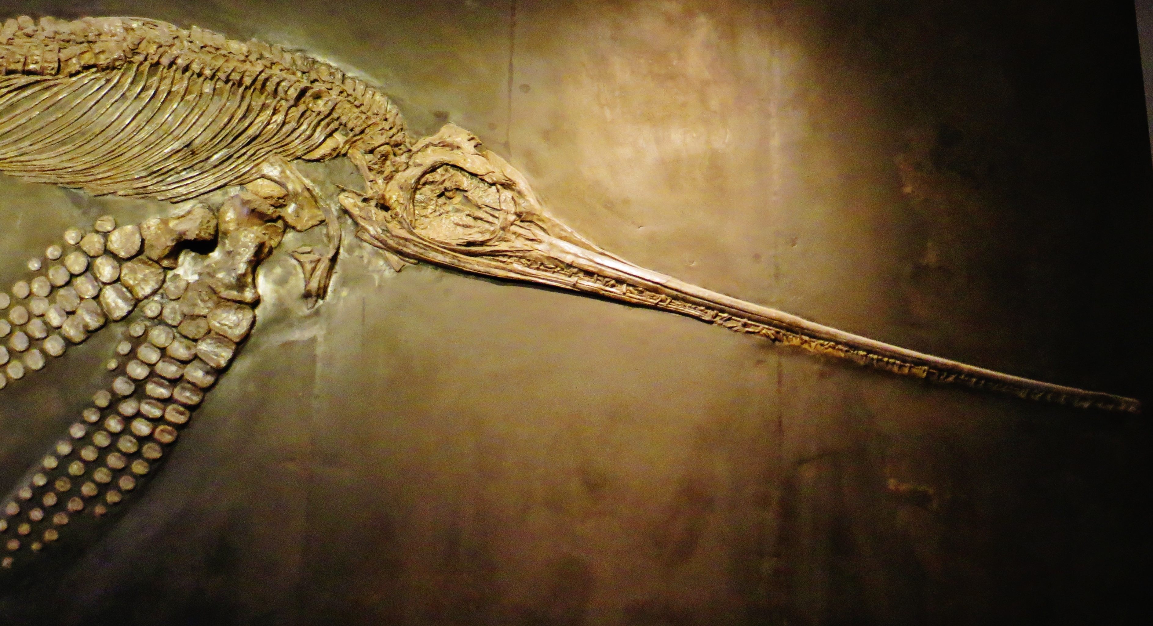 Took the picture at Senckenberg Museum, Frankfurt